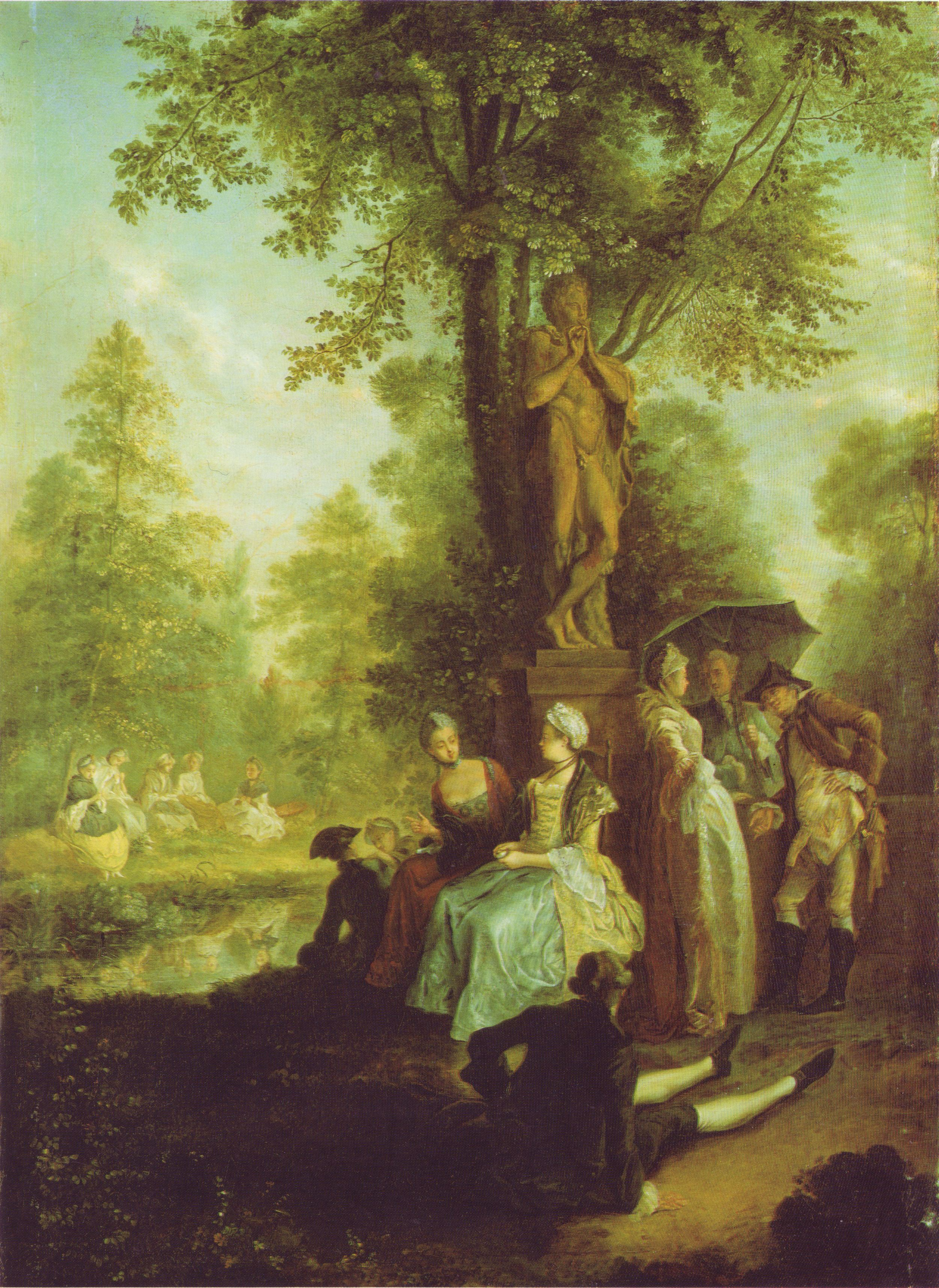 Gesellschaft im Tiergarten